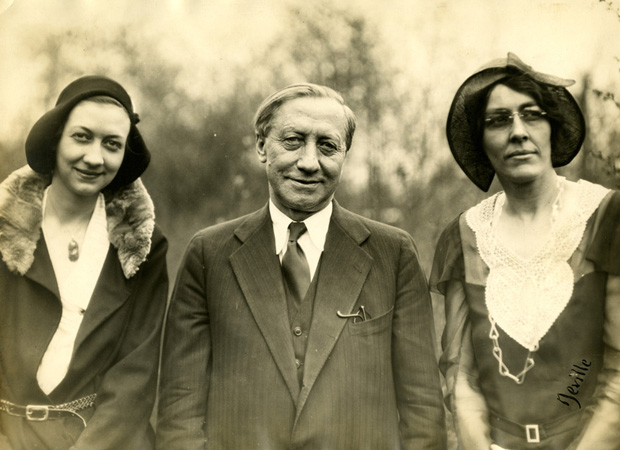 Frederick Cook con le figlie, Helen a sinistra e Ruth a destra